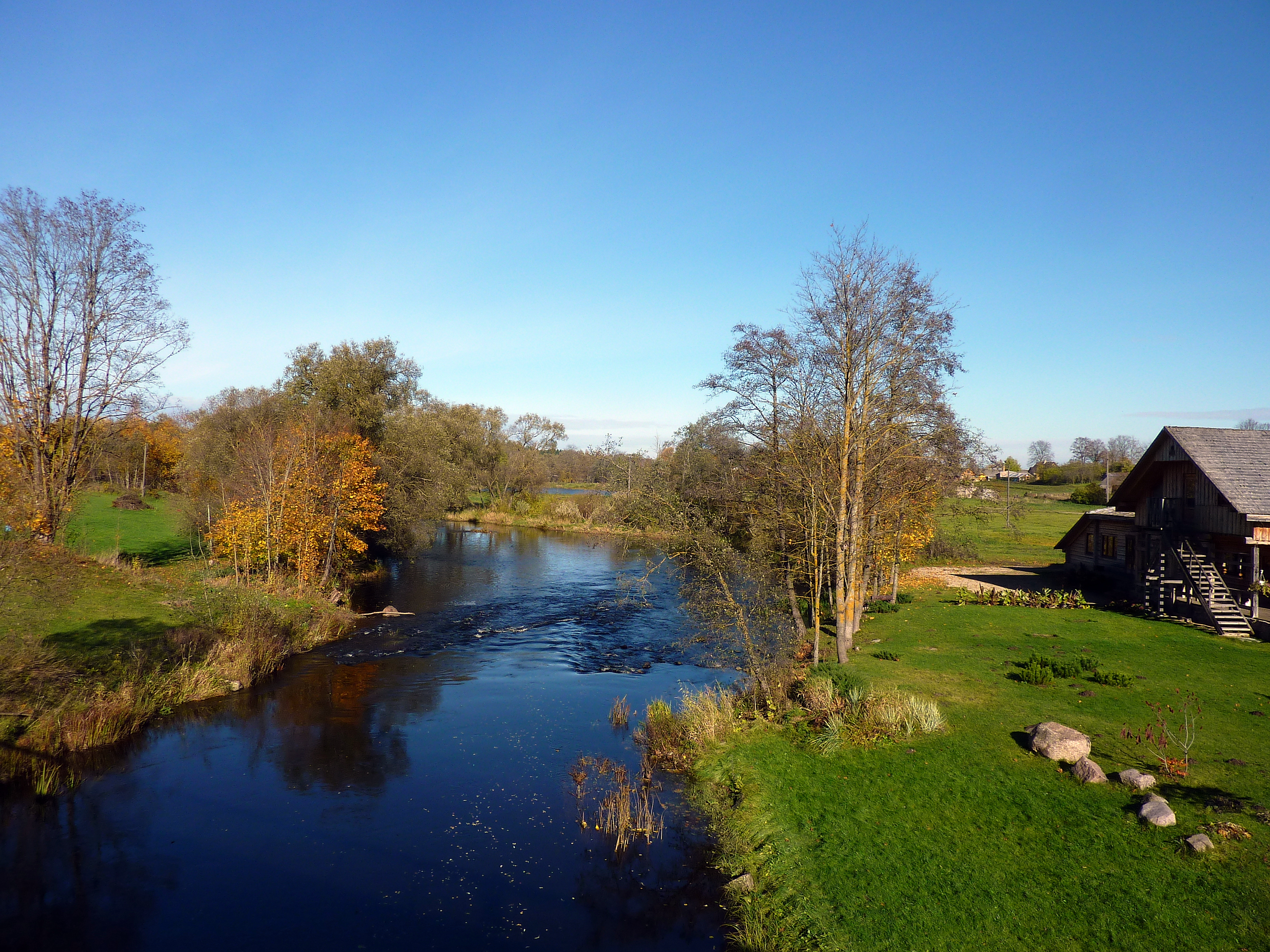 Rzeka Małta (Malta) k. miasta Wielona (Viļāni)